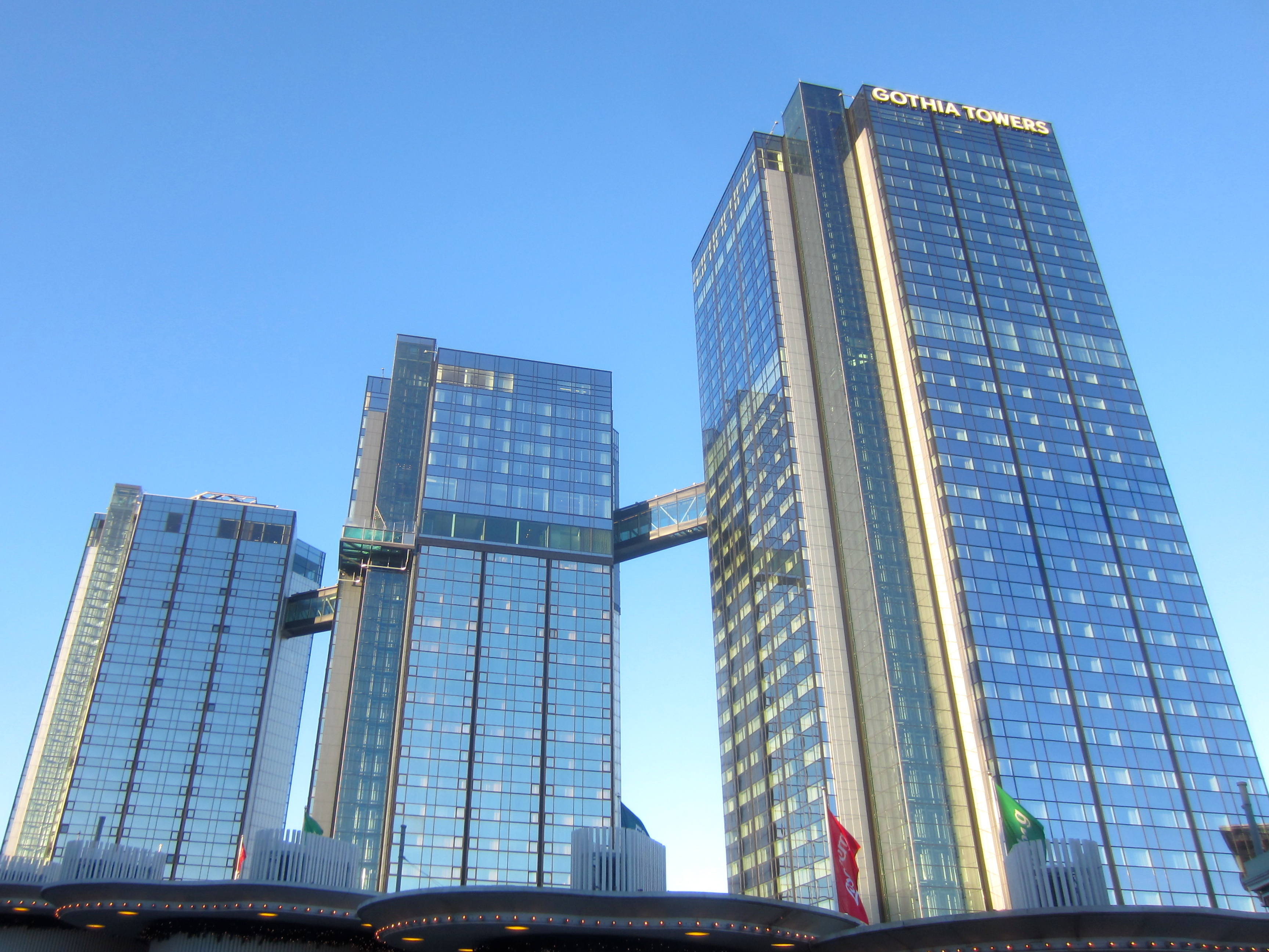 Gothia Towers i december 2014 just vid Lisebergs entré.